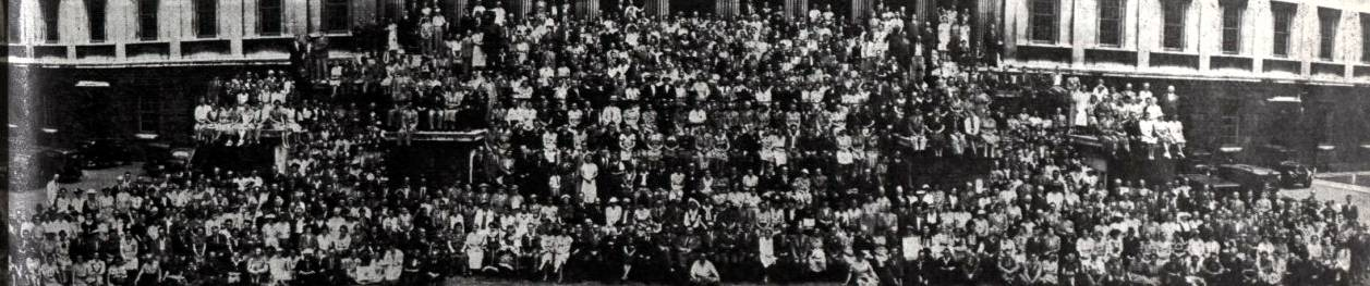 Komuna foto de la partoprenantoj de UK 1938 en Londono